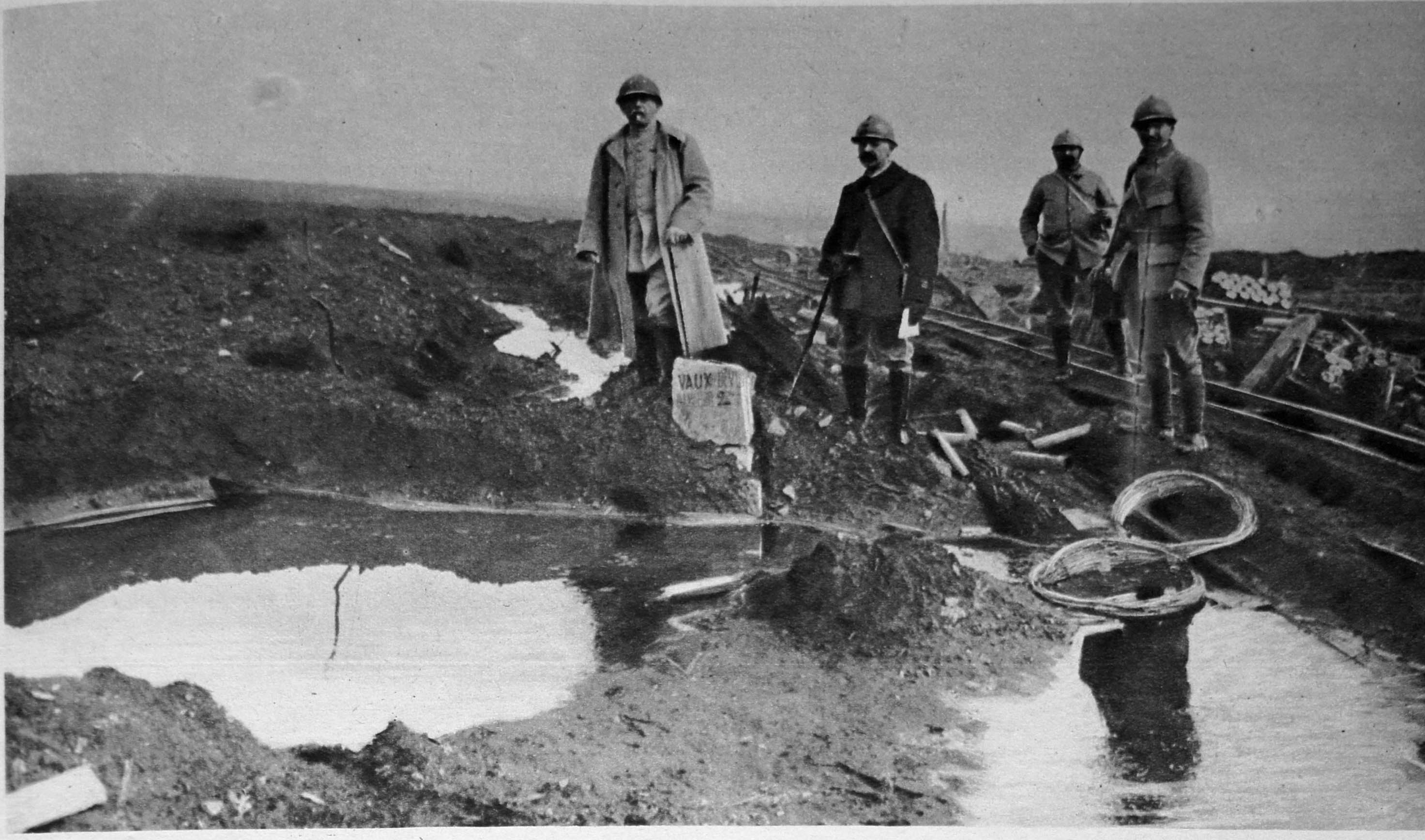 Le Miroir_N°180, page_15, le général Pierre_Dubois_à_Vaux_et une voie_ferrée.